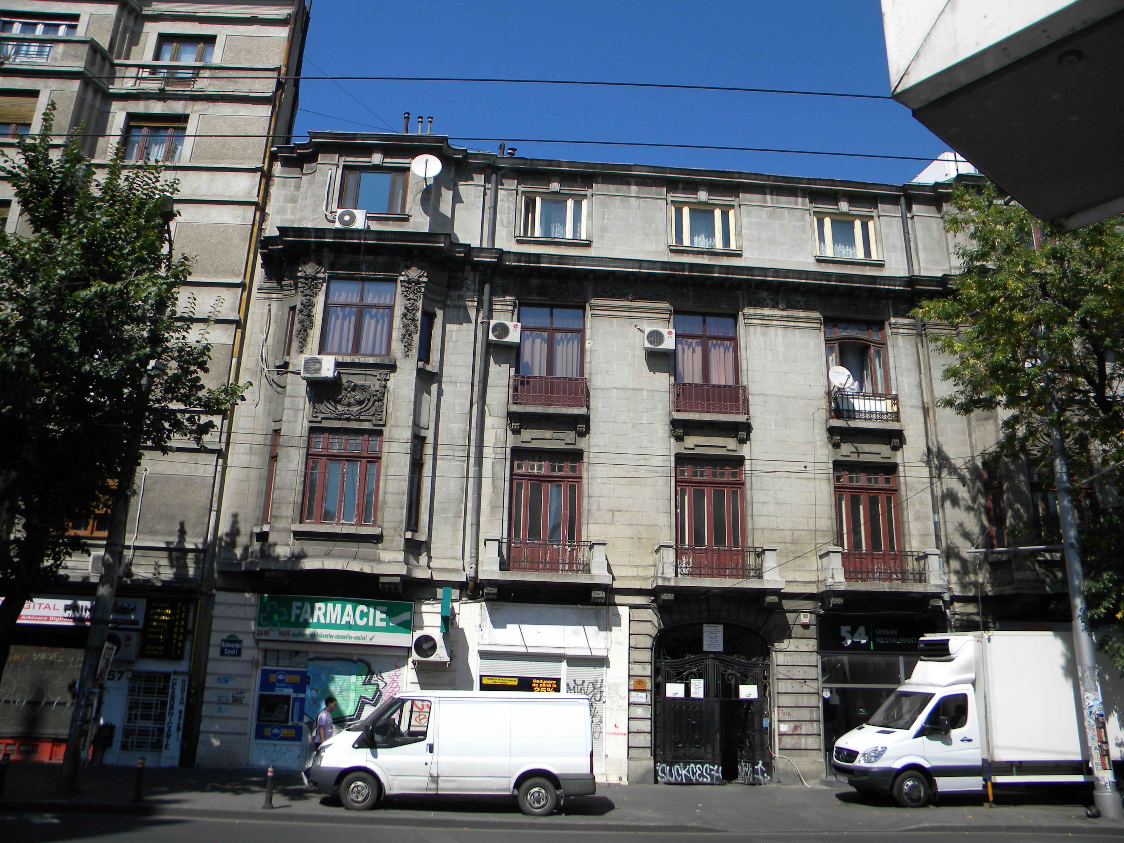 Imobil pe Bd. Carol I, nr. 59,Bucuresti sect. 2